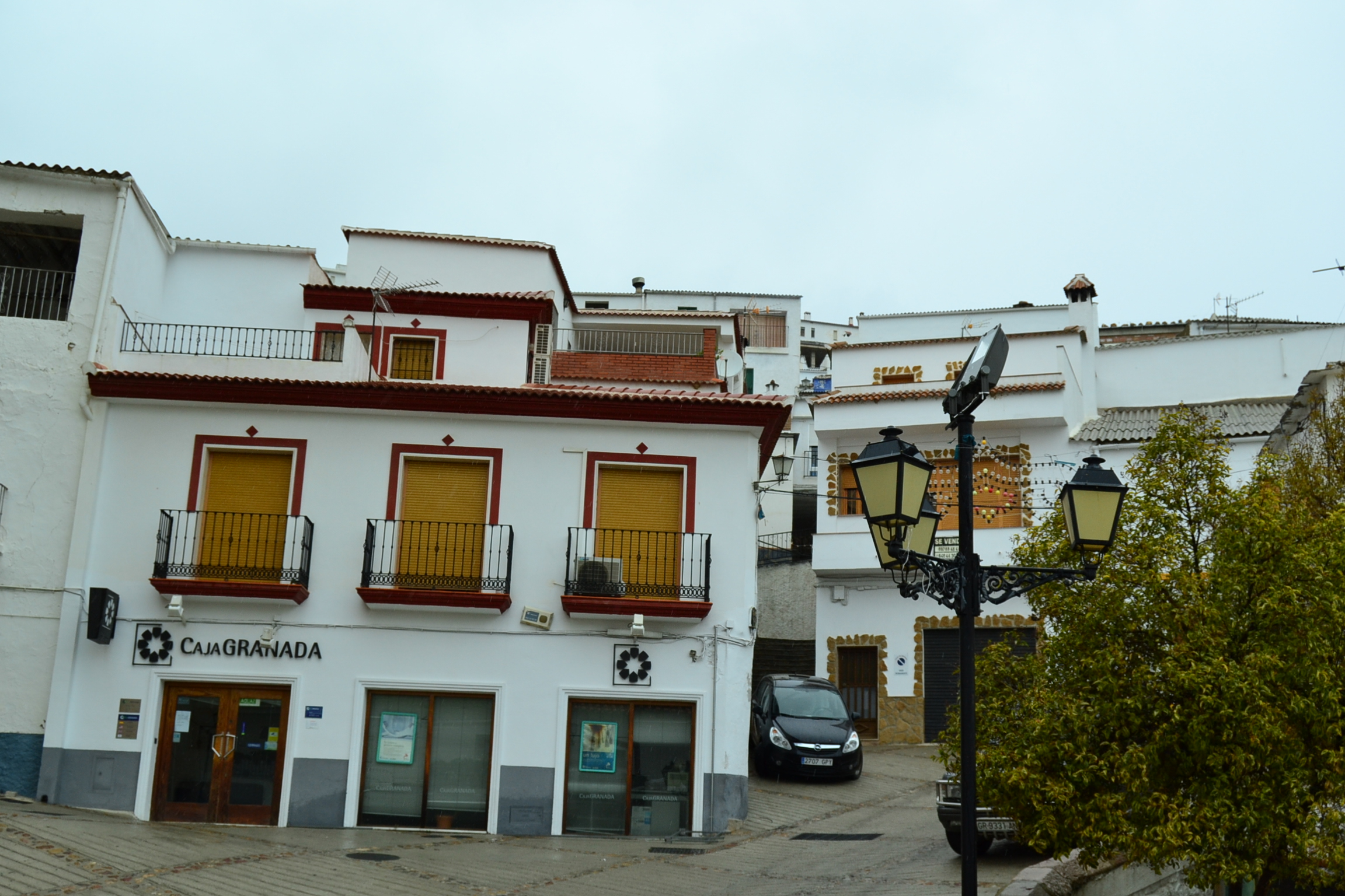 Plaza de Murtas. Abril de 2012